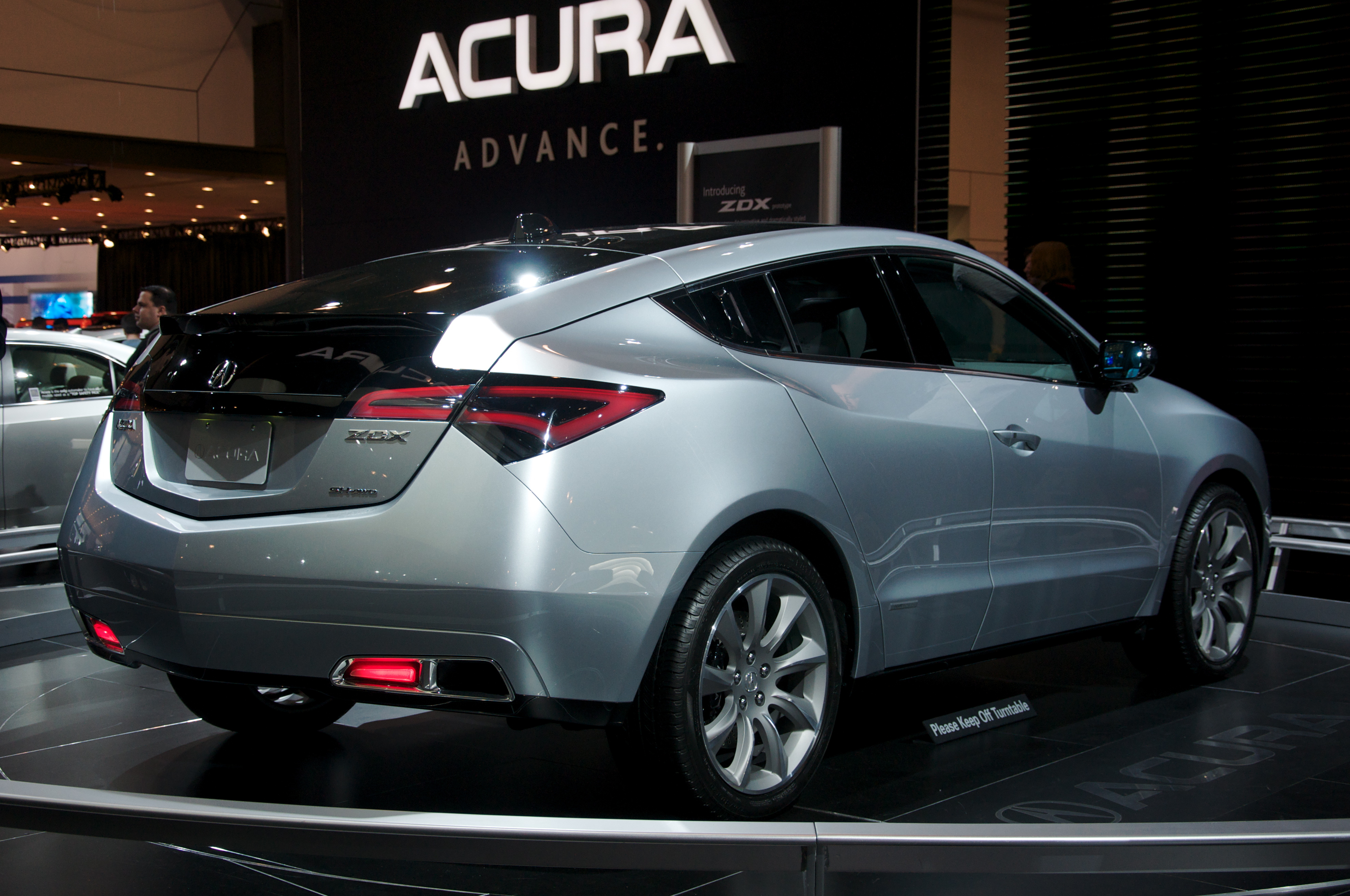 Acura ZDX Concept.